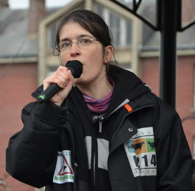 Brigitte Gothière lors de la manifestation contre la ferme des 1000-vaches à Abbeville, le 18 février 2012